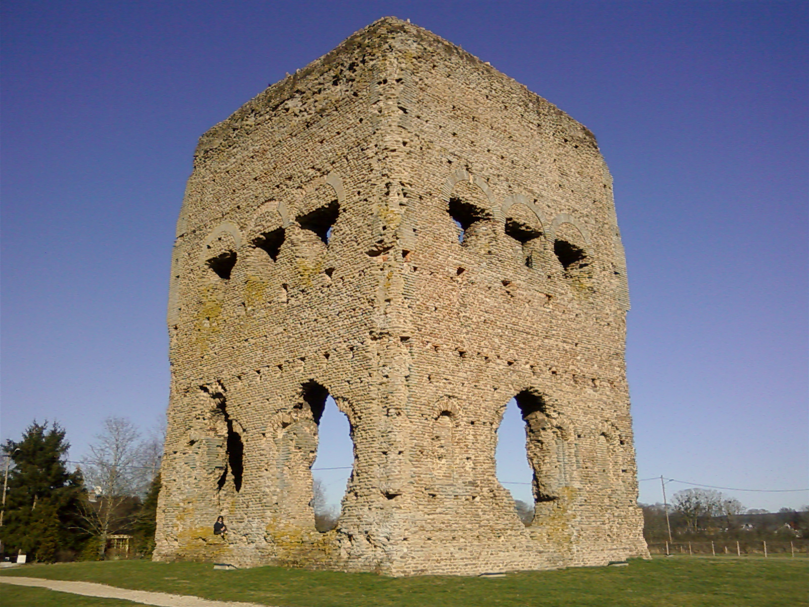 « temple de Janus » à Autun, France